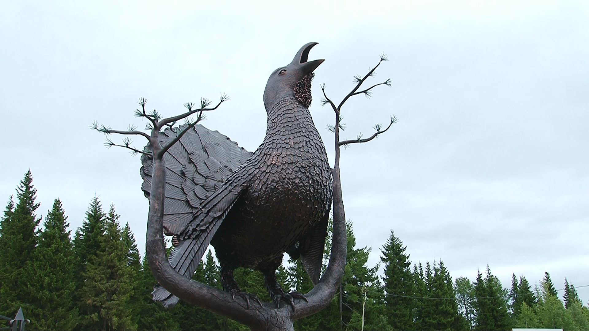 Скульптура «Токующий глухарь». Автор скульптуры - Михаил Сосин. Скульптура установлена в 2009 году в честь празднования 30-летия Сосногорского района